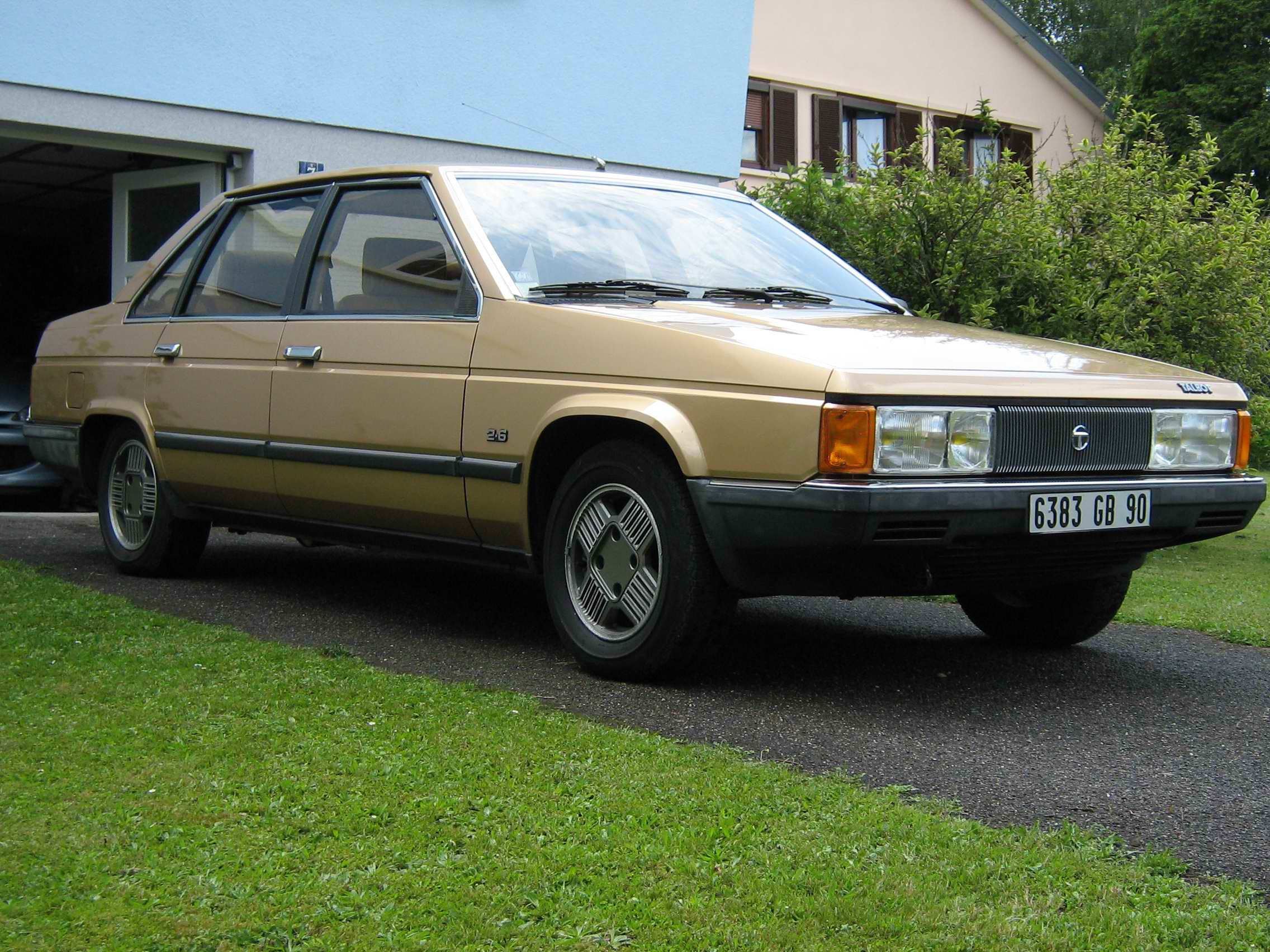 Automobile Talbot Tagora